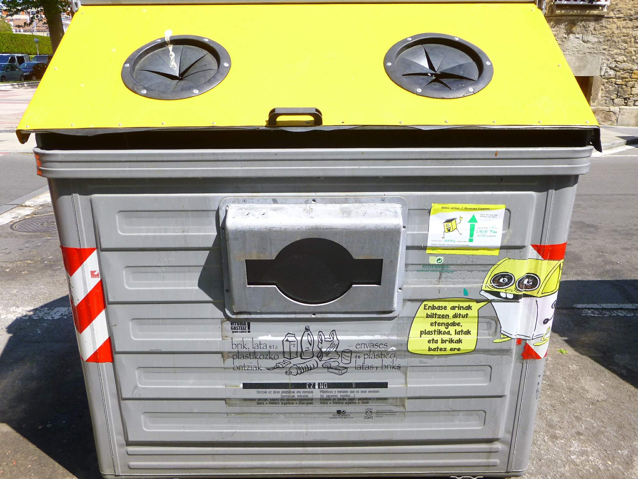 Contenedores de residuos de plástico en Vitoria